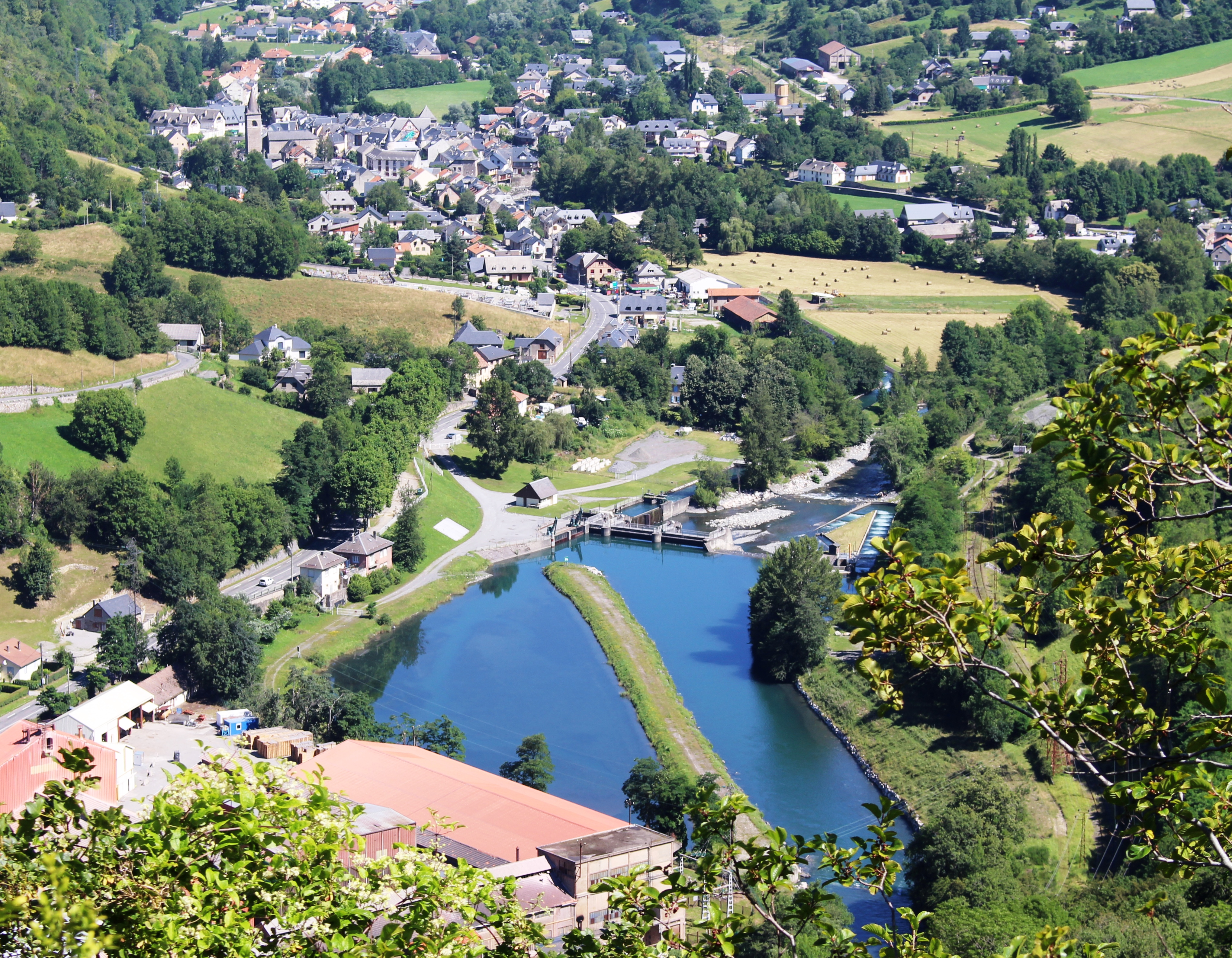 Canal de la Neste (prise d'eau) (Hautes-Pyrénées)